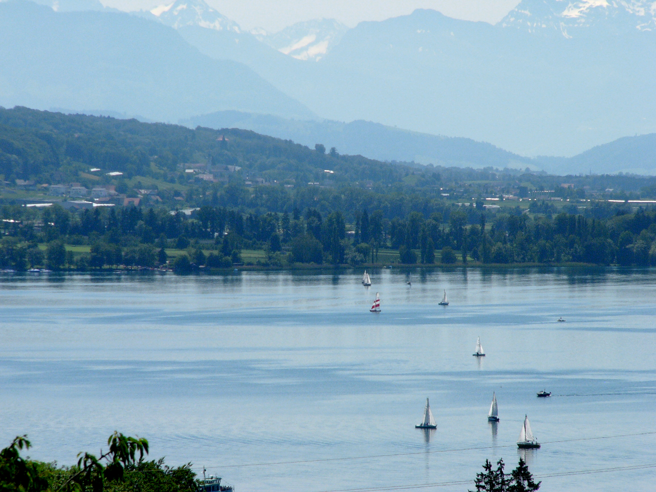 Blick von Birrwil auf den Hallwiler See in den Kantonen Aargau und Luzern, Schweiz